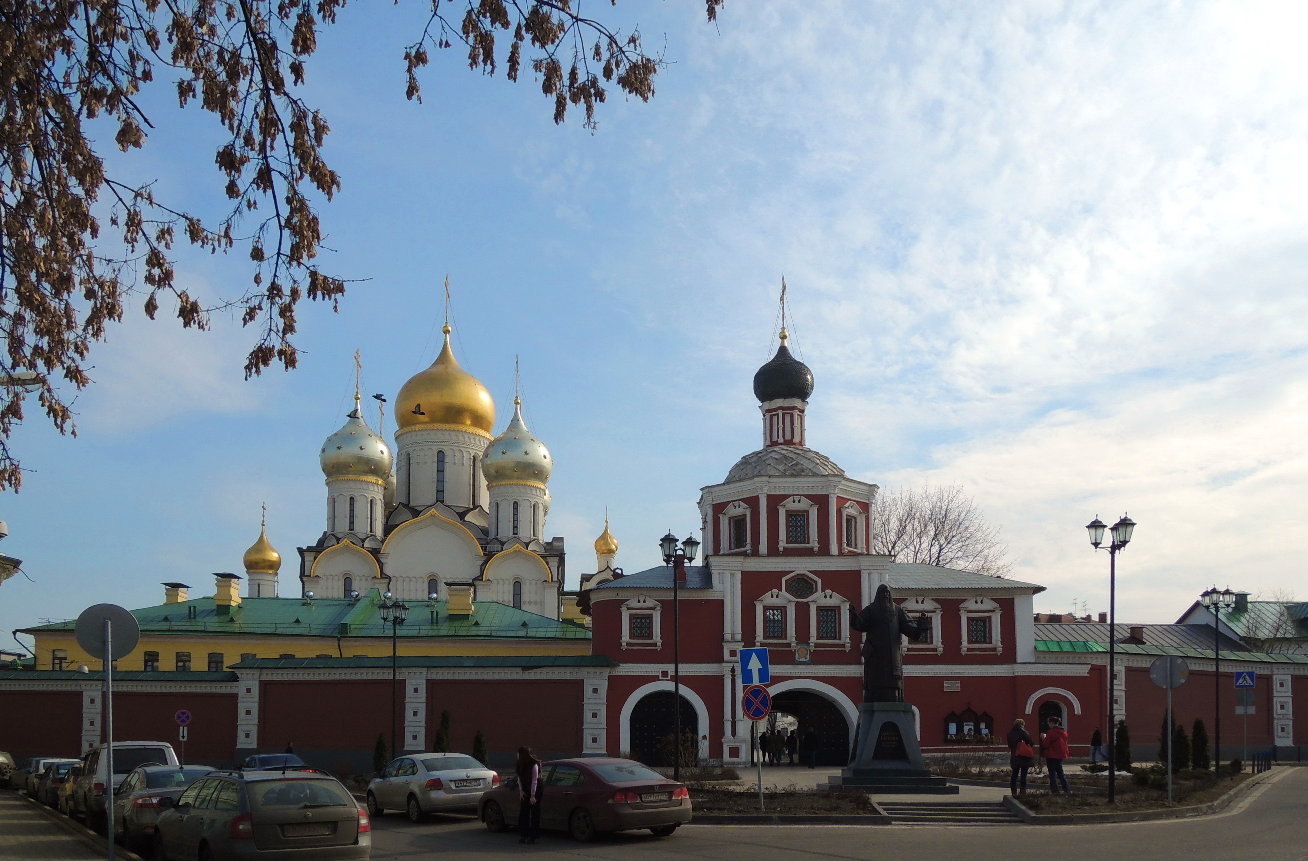 Зачатьевский монастырь